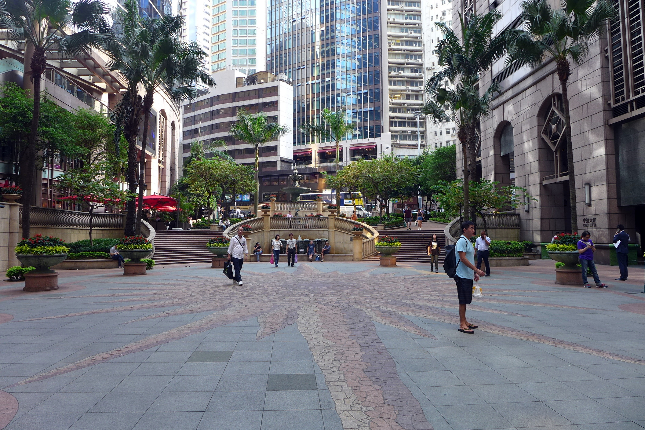 Millennium Plaza